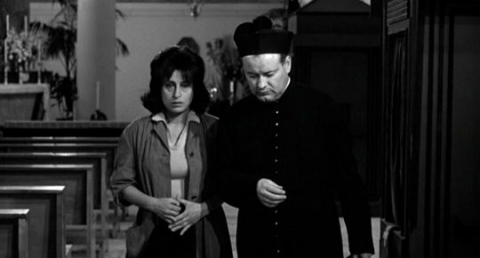 Screenshot from Mamma Roma directed by Pier Paolo Pasolini